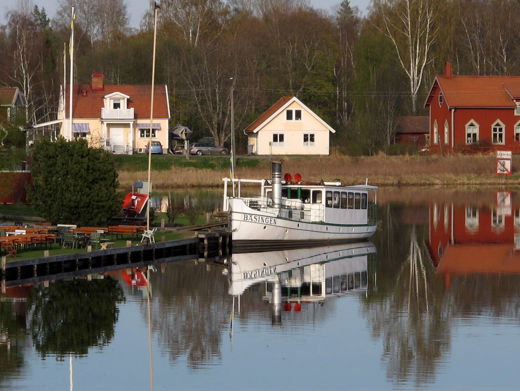 Bäsingen i Torsång